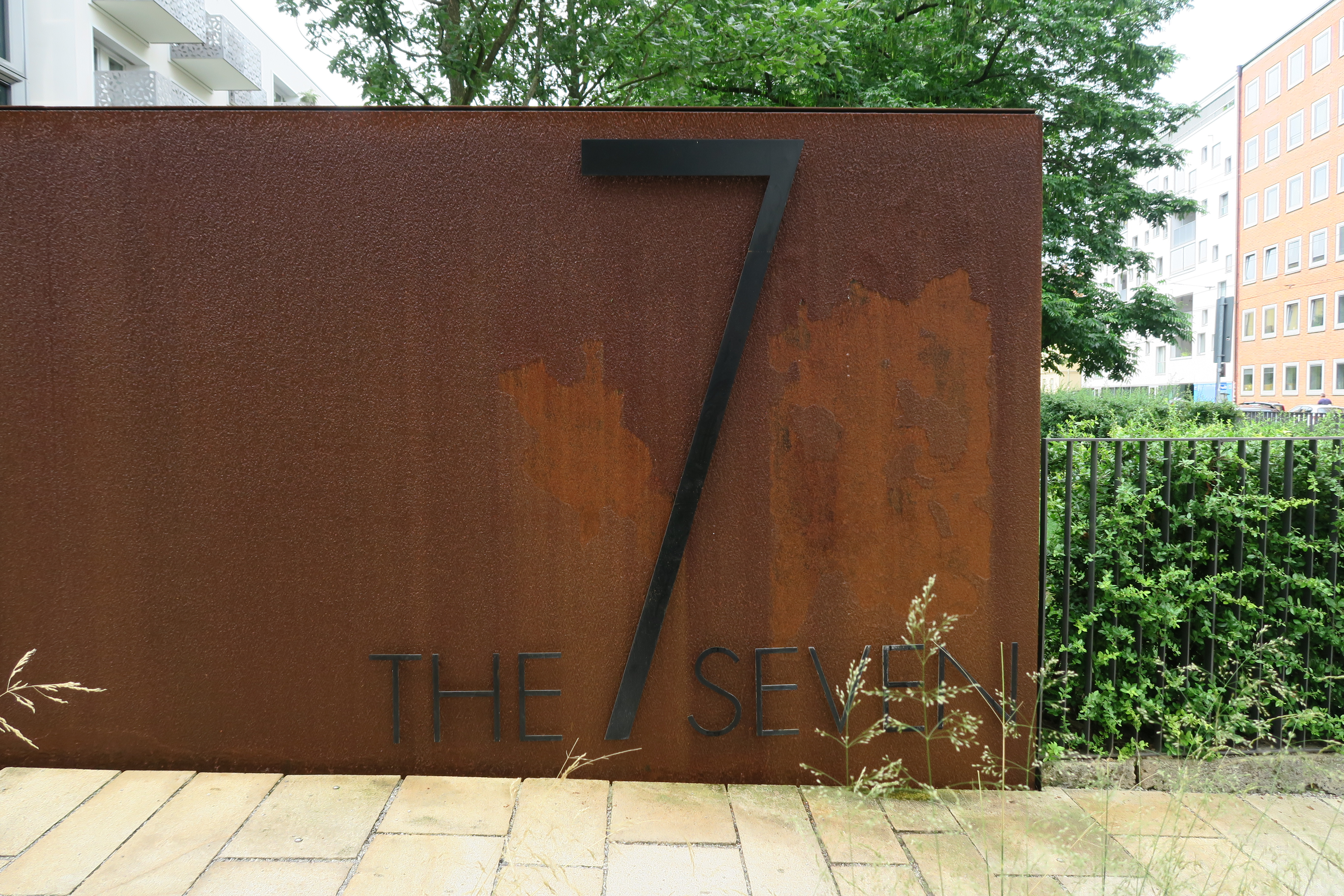 Hausschild von 'The Seven' in der Müllerstraße 7 in München